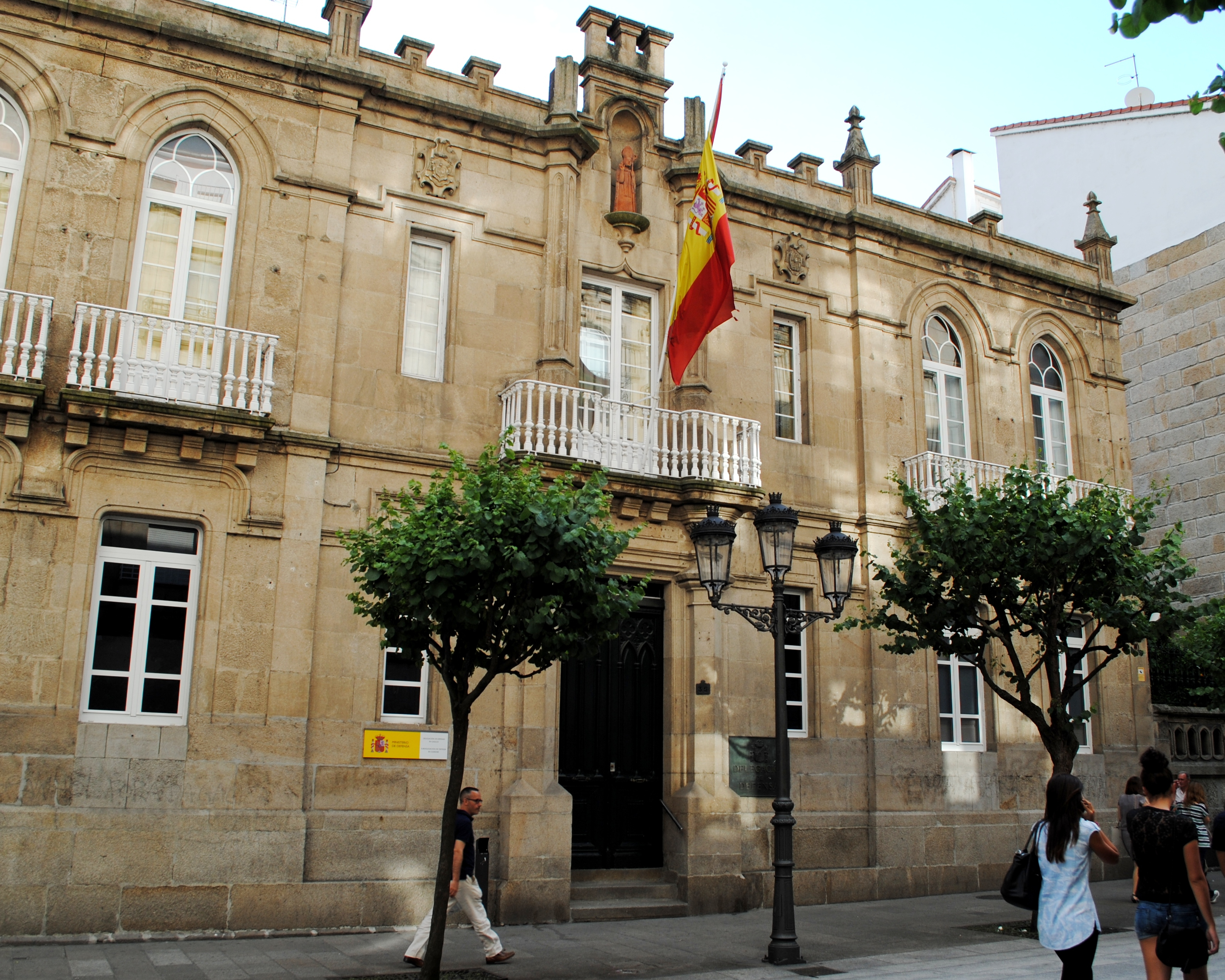 see title